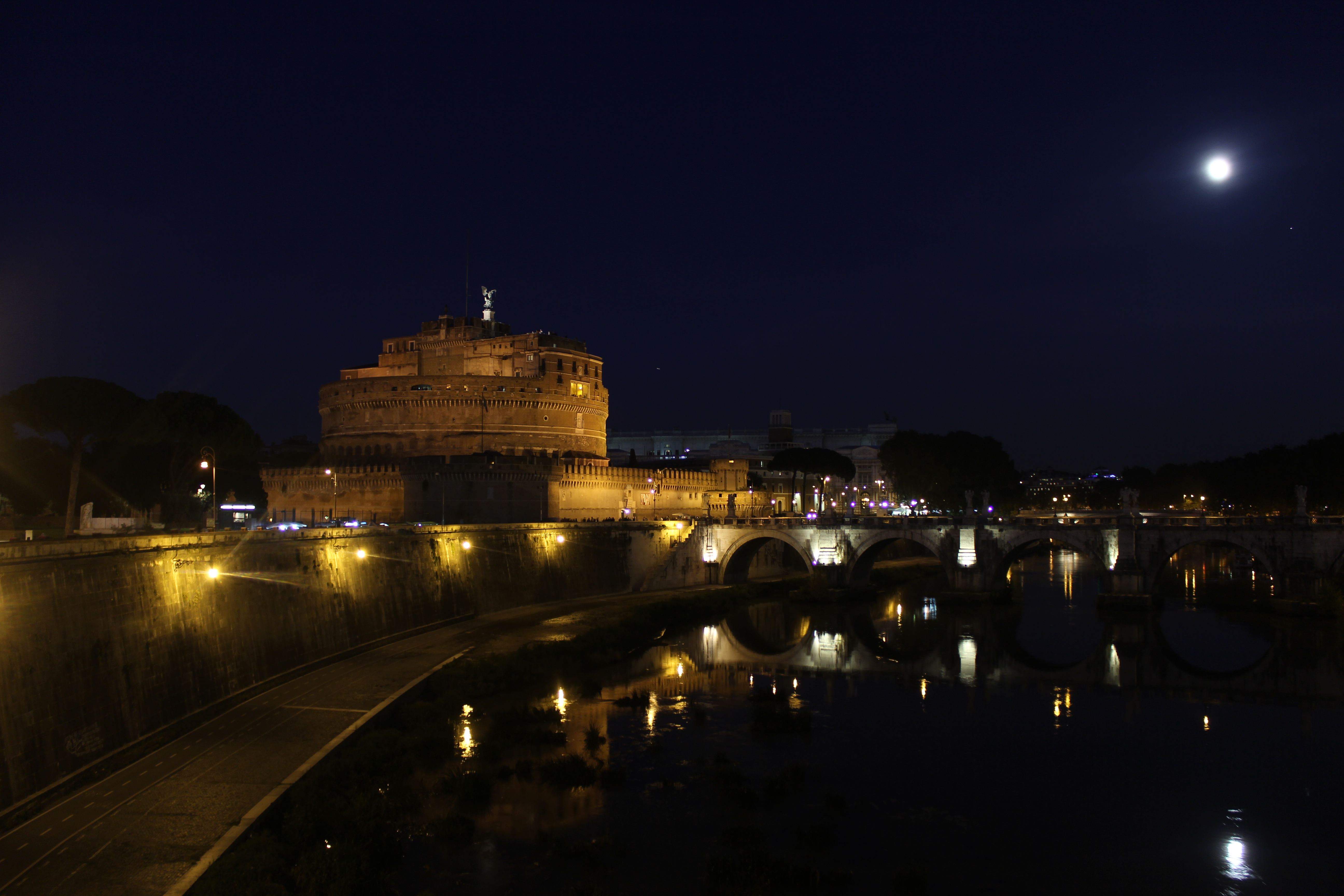 Engelsburg und Engelsbrücke bei Nacht.